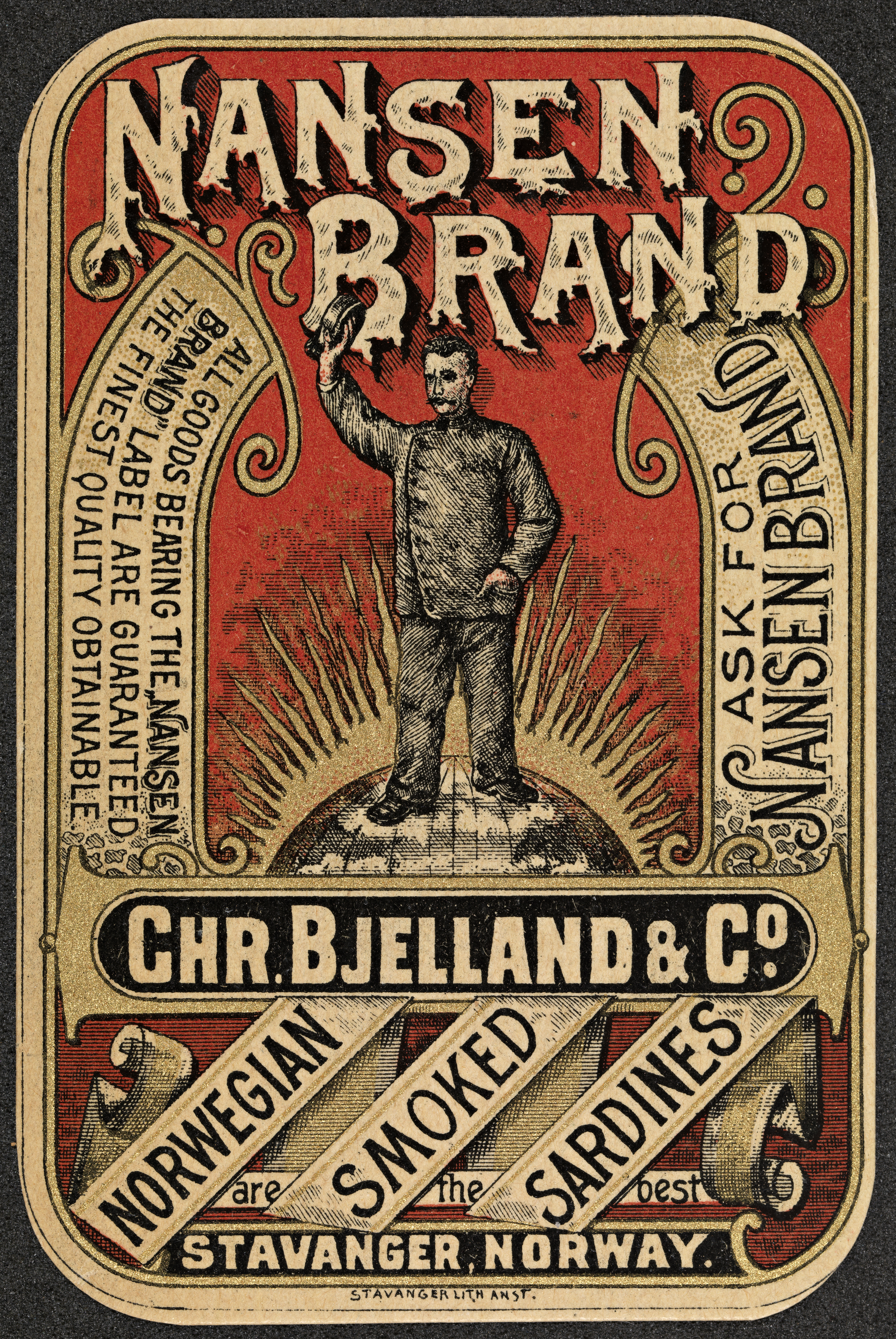 Tittel / Title: Nansen Brand Motiv / Motif: Etikett for sardinboks / label for canned sardines. Tegningen av Nansen er laget på grunnlag av et fotografi tatt av L. Szacinski ved Nansens hjemkomst fra Grønland i 1889. Dato / Date: 1896 Kreditering / Credit: Bjellands Fabrikker / Stavanger Lith. Anst. Eier / Owner Institution: Nasjonalbiblioteket / National Library of Norway Lenke / Link: Bildesignatur / Image Number: smtrk_03050